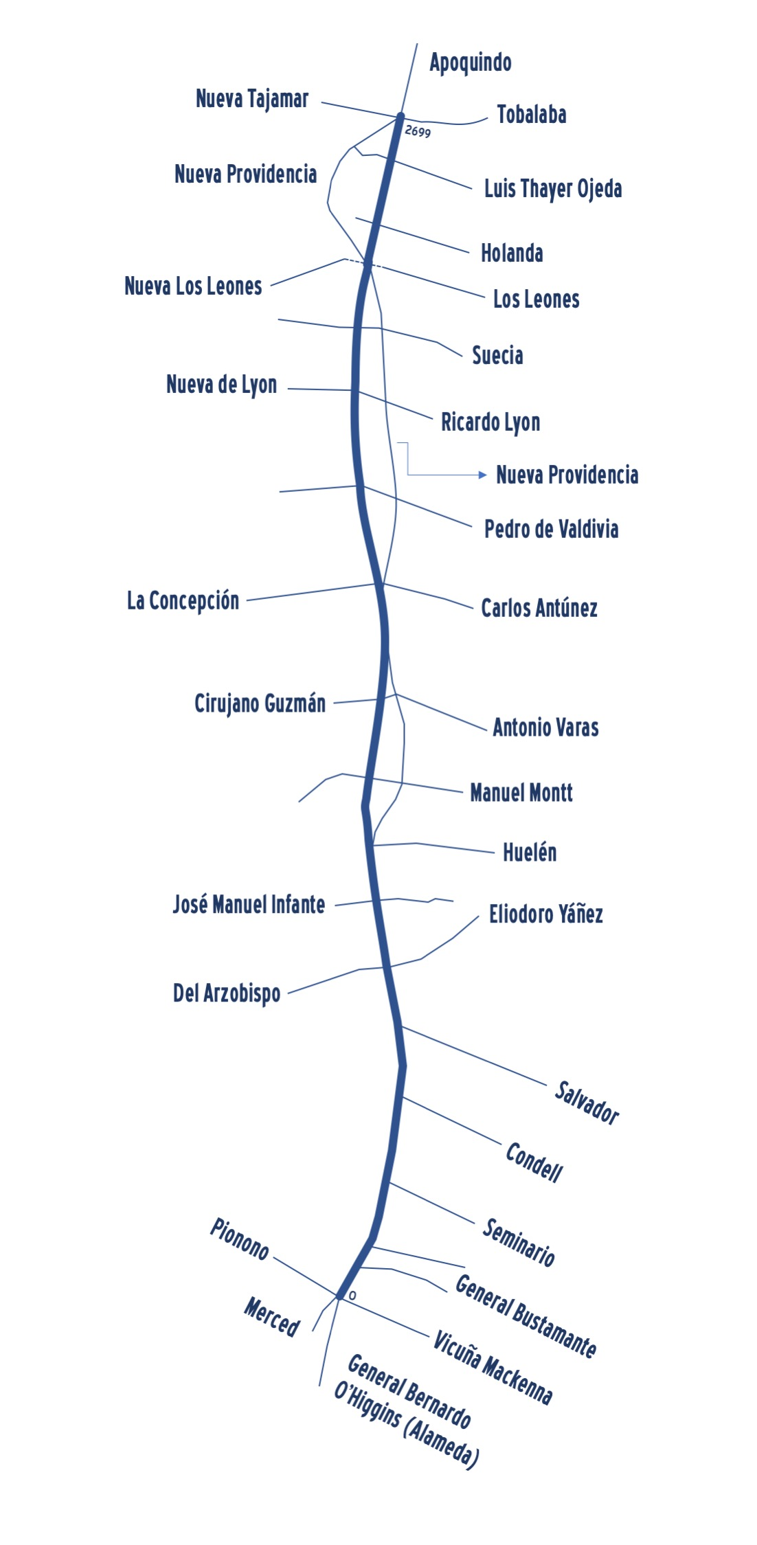 Cruces semaforizados de Avenida Providencia, en Providencia, Chile.